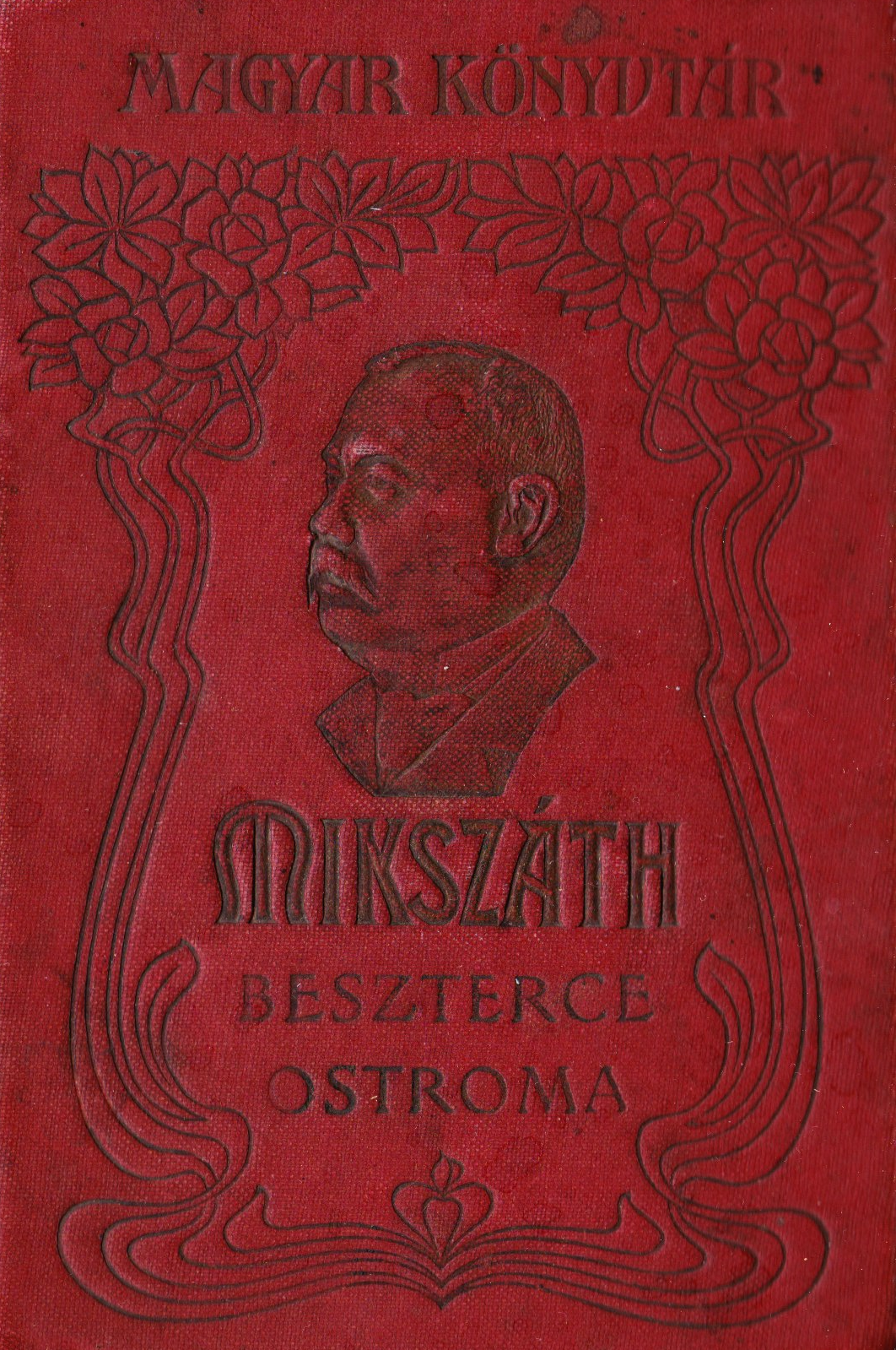 Mikszáth Beszterce ostroma könyvborító, 1890-es évek